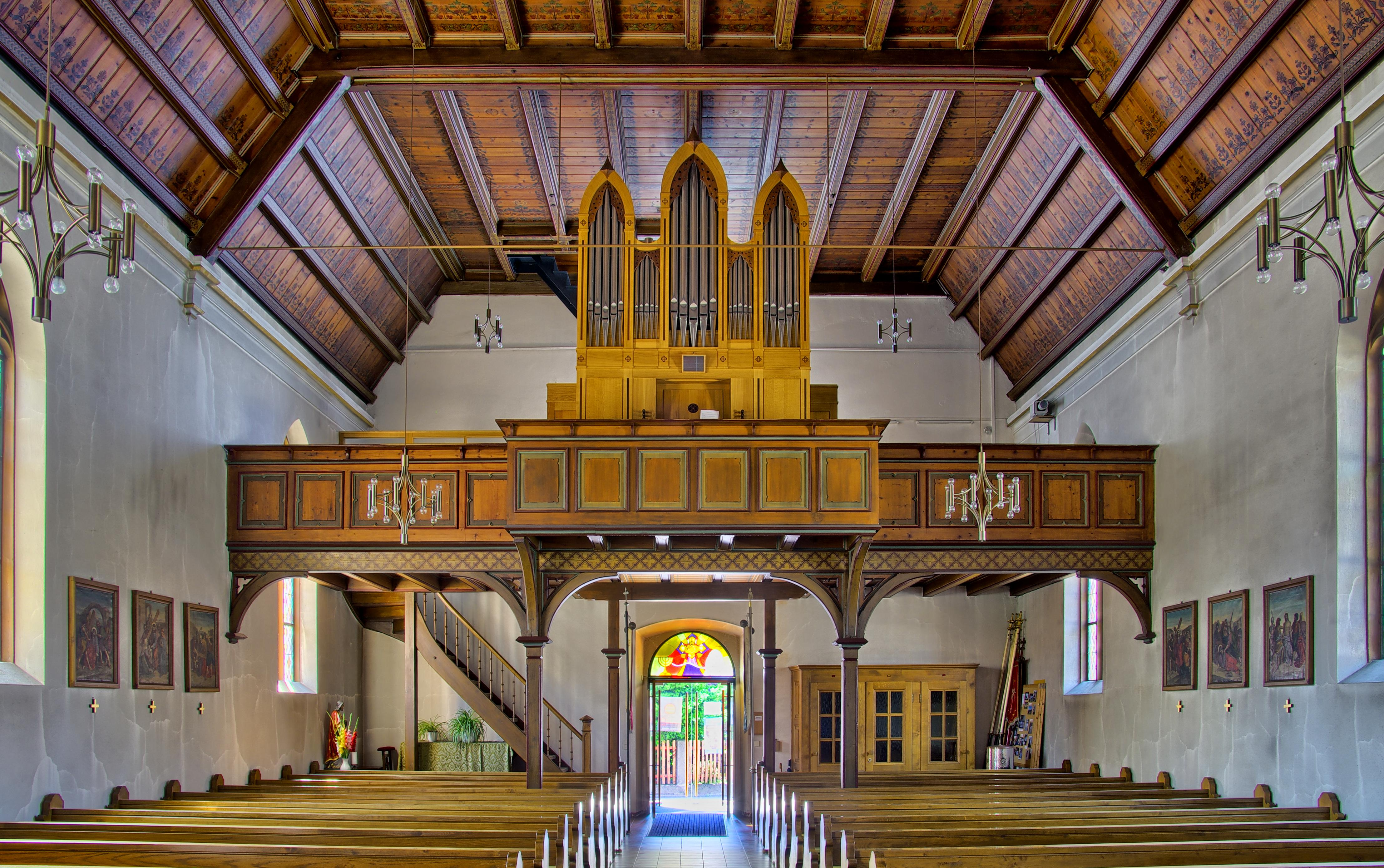 Die St. Anastasius Kirche in Erlach bei Renchen